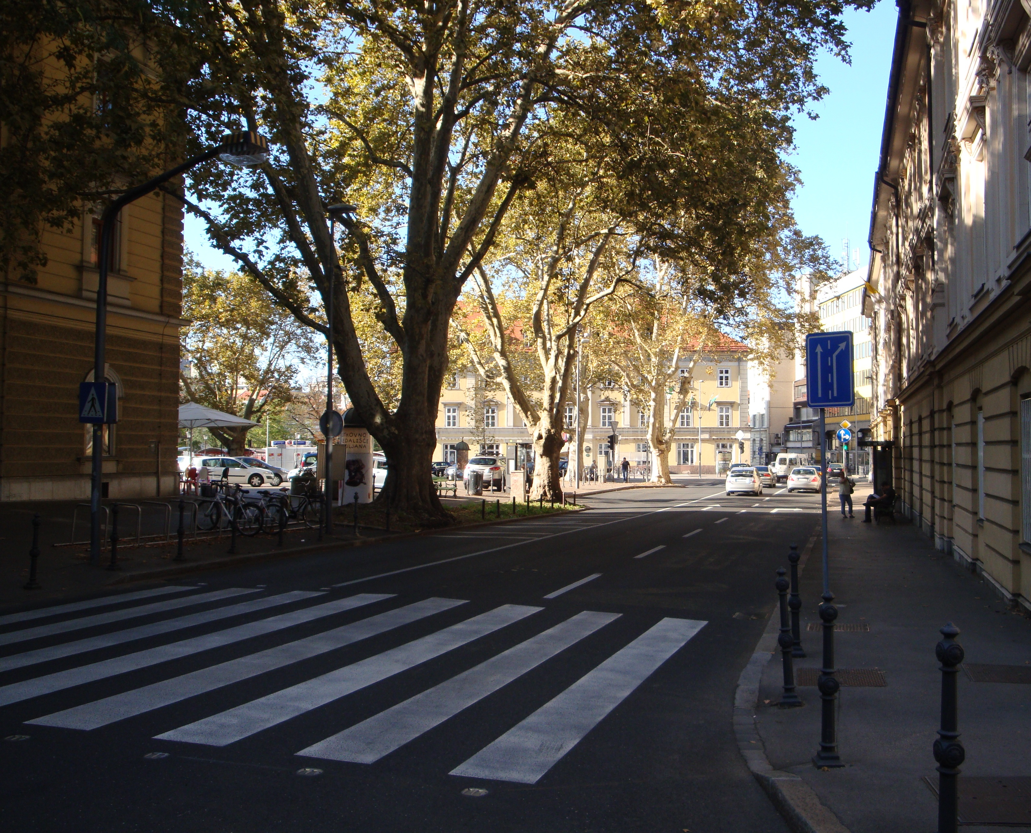 Kopitarjeva ulica v Ljubljani